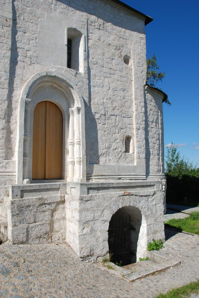 Церковь Рождества Пресвятой Богородицы.